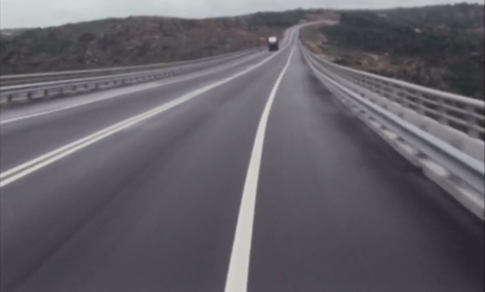 Viaduto do IP5 sobre o Rio Côa em 1989, poucos meses depois da sua inauguração